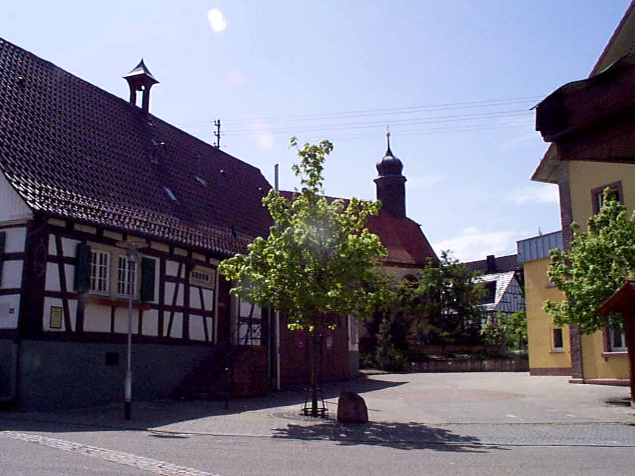 Rathausplatz mit angrenzenter St-Ignatius Kapelle Sulzbach (Malsch)